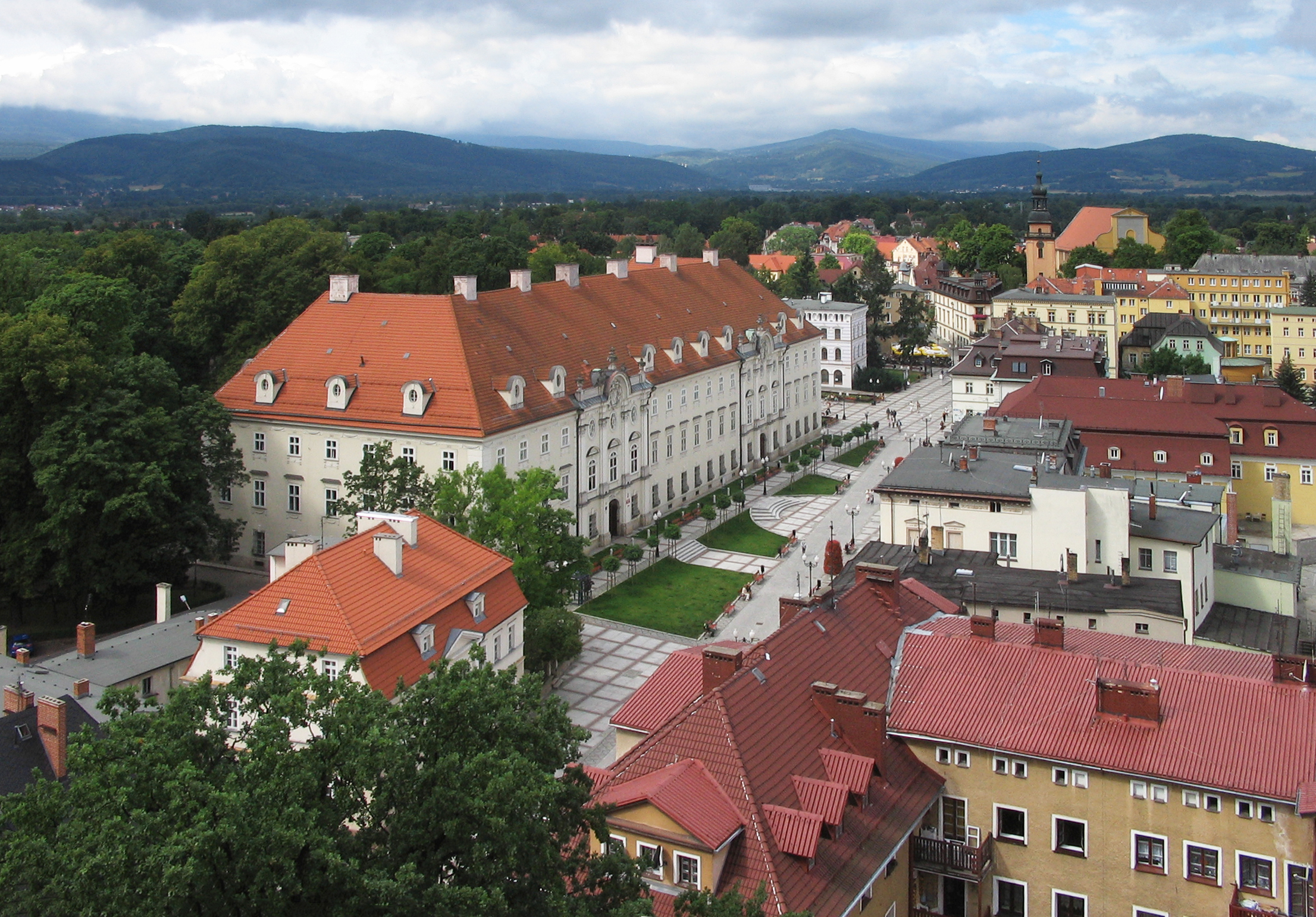 Plac Piastowski - widok z wieży Kościoła Ewangelicko-Augsburskiego pw. Zbawiciela